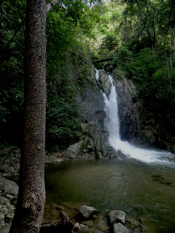 Salto de agua en el río del Norte. Guatire. Venezuela